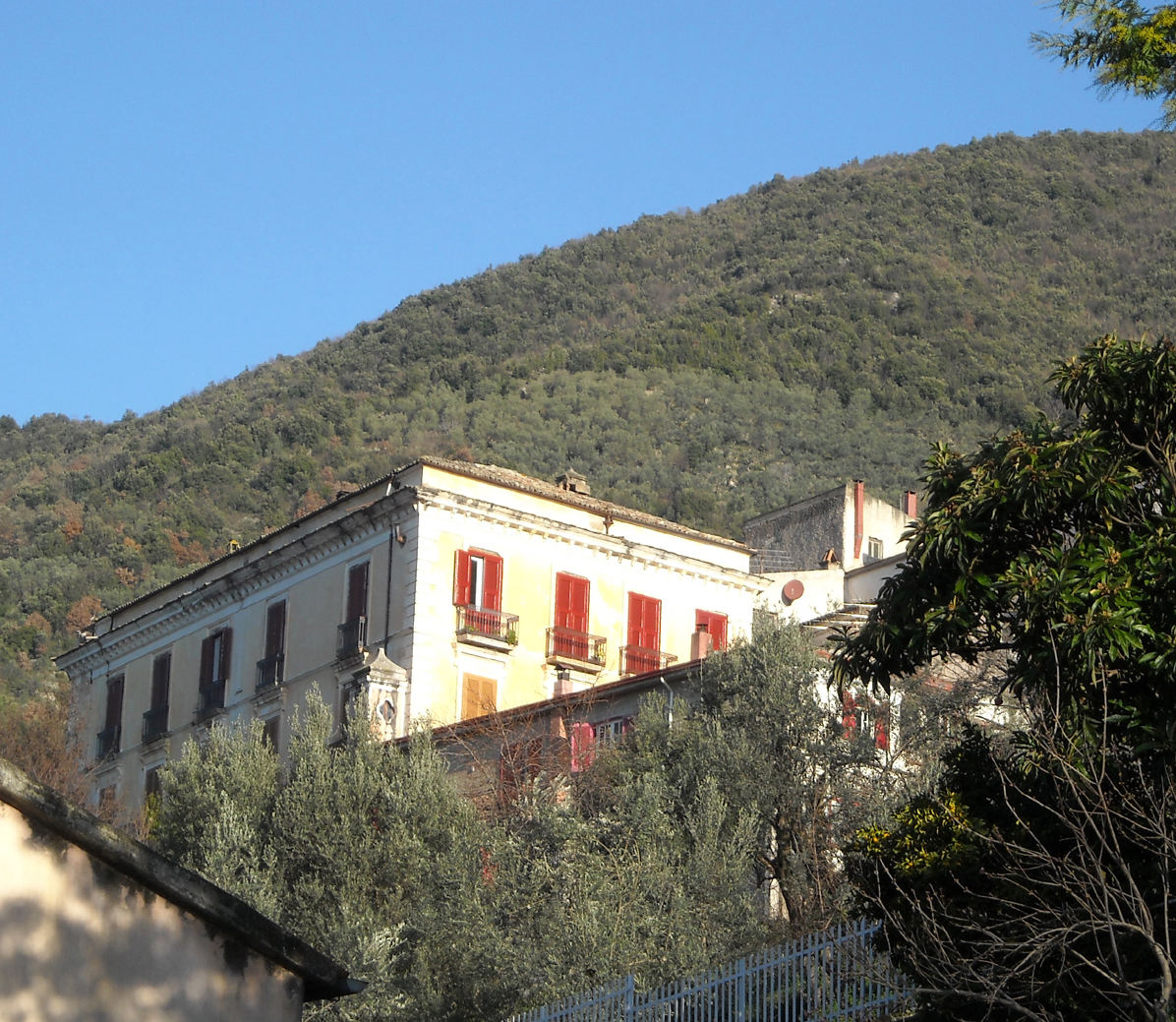 Luigi Bruno Di Cosmo; foto propria; S, Angelo d'Alife. Palazzo Cicerchia; pubblico dominio